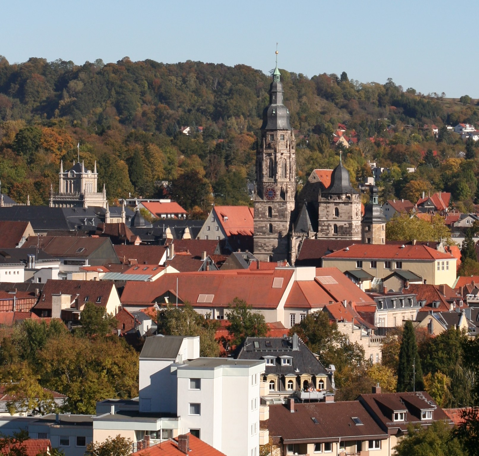 Morizkirche Blick vom Wasserbehälter Plattenäcker, Coburg (Germany)